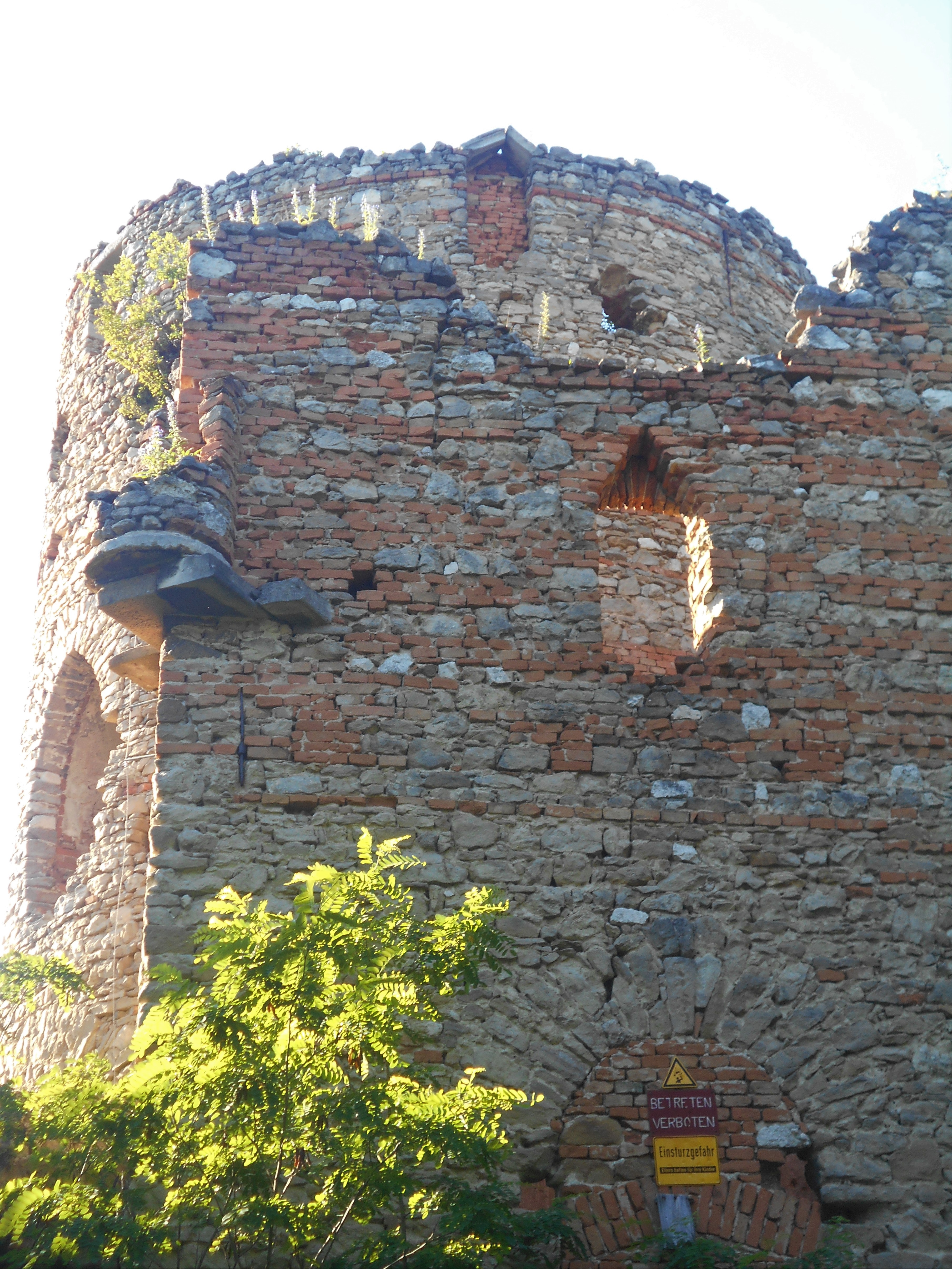 Hauptobjekt der künstlichen Ruine Hanselburg Diese Datei wurde im Rahmen von WikiDaheim 2020 in Österreich erstellt und hochgeladen.Sie wurde dem Themenbereich Kunst im öffentlichen Raum (Public art) zugeordnet.